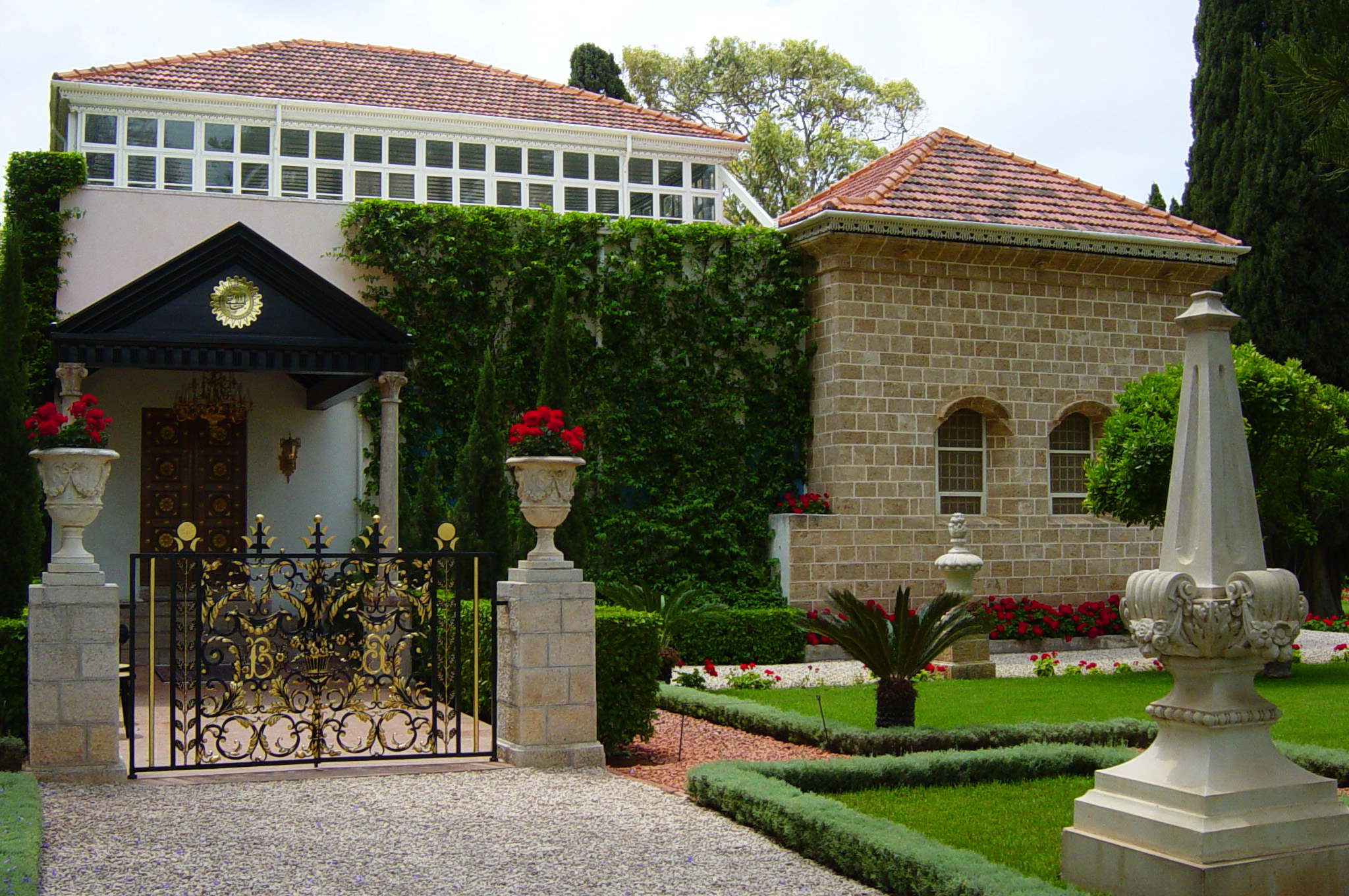 Shrine of Baha'u'llah